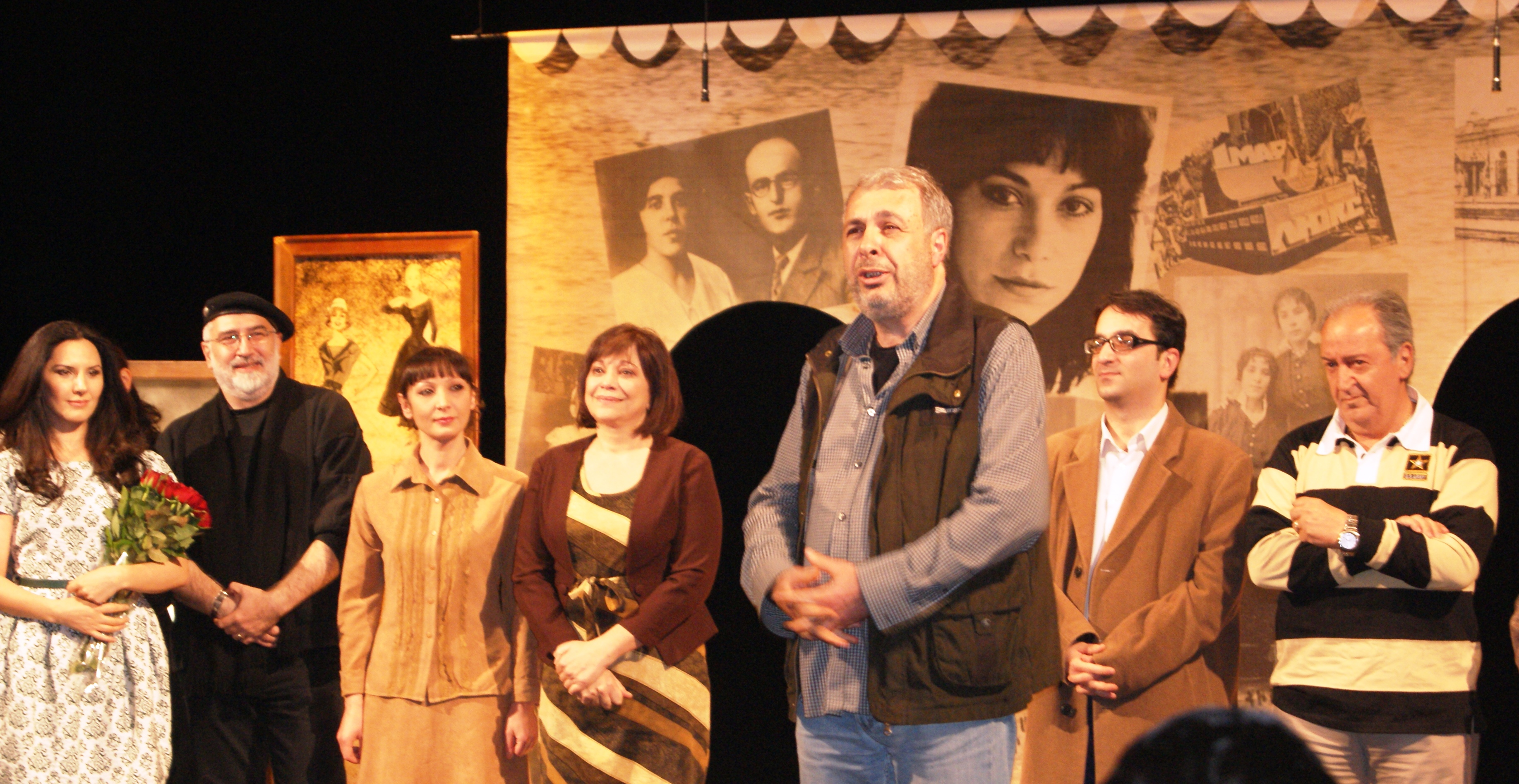 Mercedes play